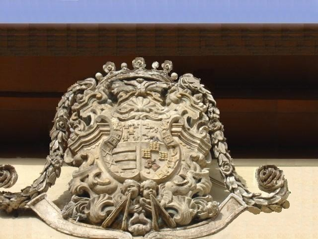 Escudo de armas de los Vizcondes de Quintanilla de Flórez en la Casa Palacio de los Vizcondes de Quintanilla de Flórez en la Plaza de San Isidoro en León. Título nobiliario español otorgado en 1651 por S.M. el Rey don Felipe IV de España a don Gabriel Flórez-Osorio y de Quiñones, para él y sus sucesores, teniendo consideración a la calidad y antigüedad de su casa y mayorazgo. La Real Cédula de Concesión, firmada en Madrid el 24 de septiembre de 1651, concede jurisdicción sobre la villa de Quintanilla de Flórez, en la actualidad, localidad y pedanía del municipio de Quintana y Congosto en la provincia de León.